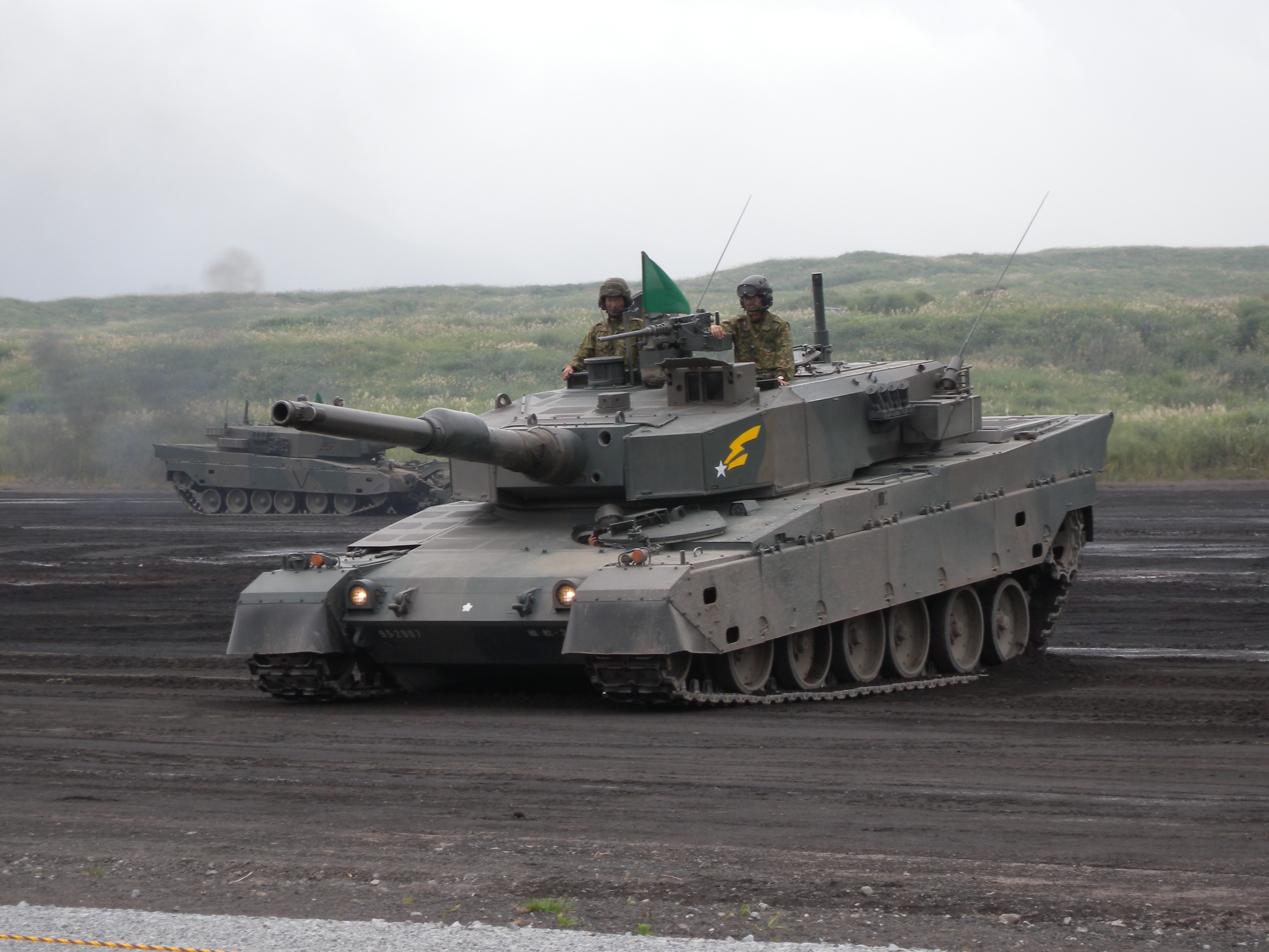 車体を前傾させる90式戦車。東富士演習場畑地区・平成21年度富士総合火力演習にて。 Nikon Coolpix P6000